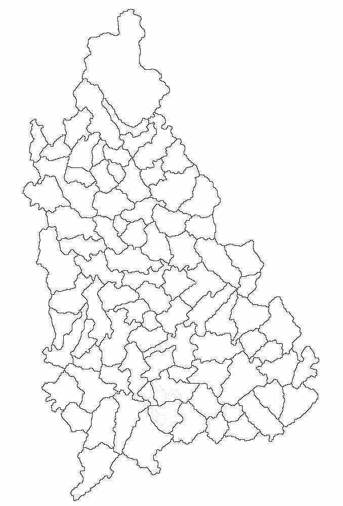 Categorie:Hărţi ale judeţului Dâmboviţa